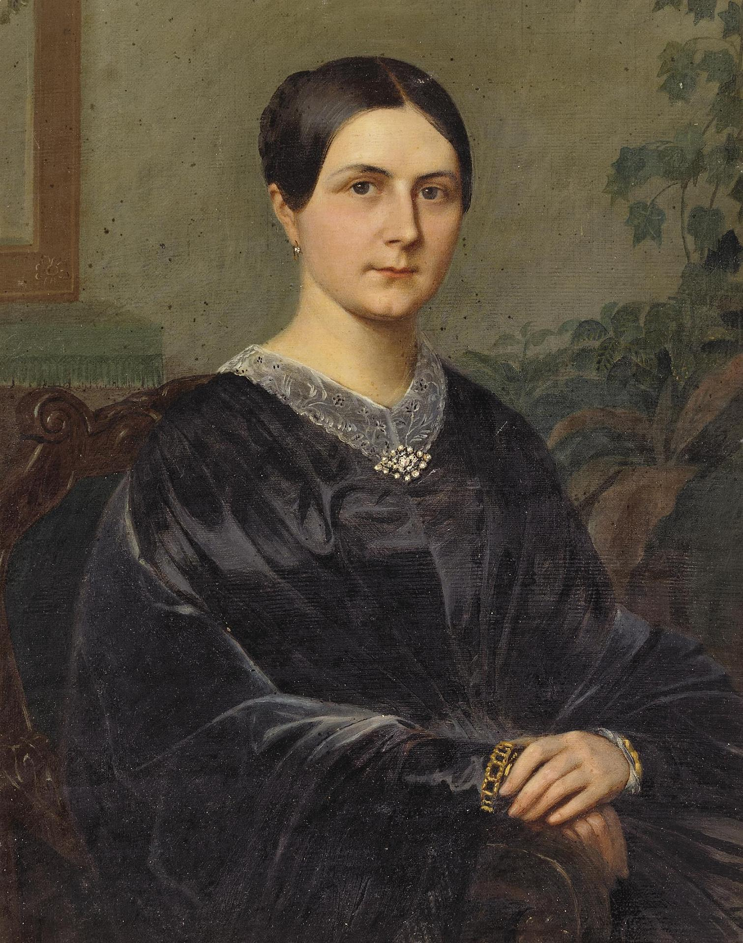 Елизавета Николаевна Одинцова, урожденная Манзей (22.07.1824-20.09.1860), дочь генерал-майора Николая Логгиновича Манзея (1784—1862) от брака его с Софьей Сергеевной Яковлевой.